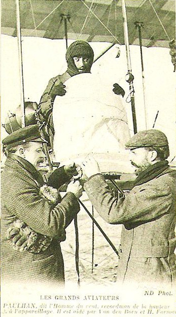 Paulhan, Farman et van der Born trois aviateurs lors de la Grande Semaine d'Aviation de la Champagne (1910) .